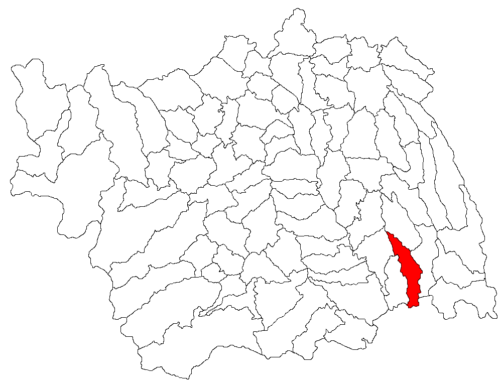 Categorie:Hărţi ale judeţului Bacău